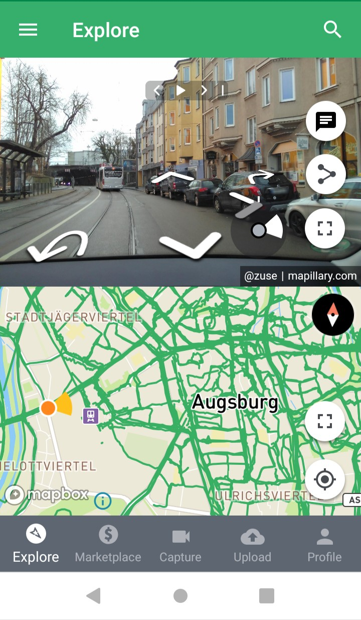 Screenshot von Mapillary auf Android